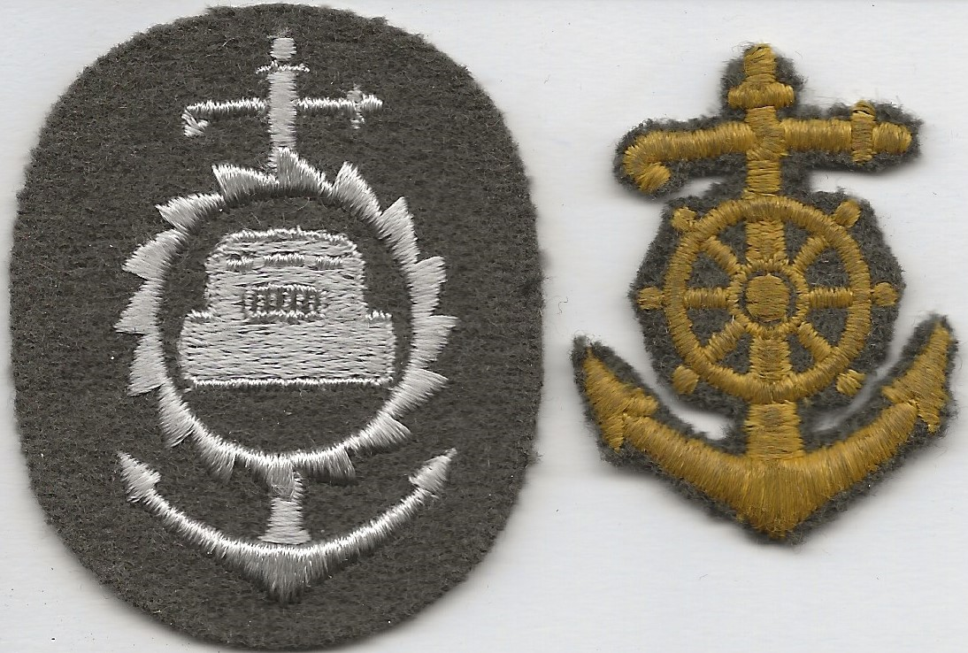 Dienstlaufbahnzeichen der Landstreitkräfte der NVA (KVP), allgemeiner Pionier (links). Steuermann (rechts Nr. 24). Das spezielle Steuermannzeichen der Landeübersetzpioniere wurde verboten und musste von den Uniformen entfernt werden (1972-73)